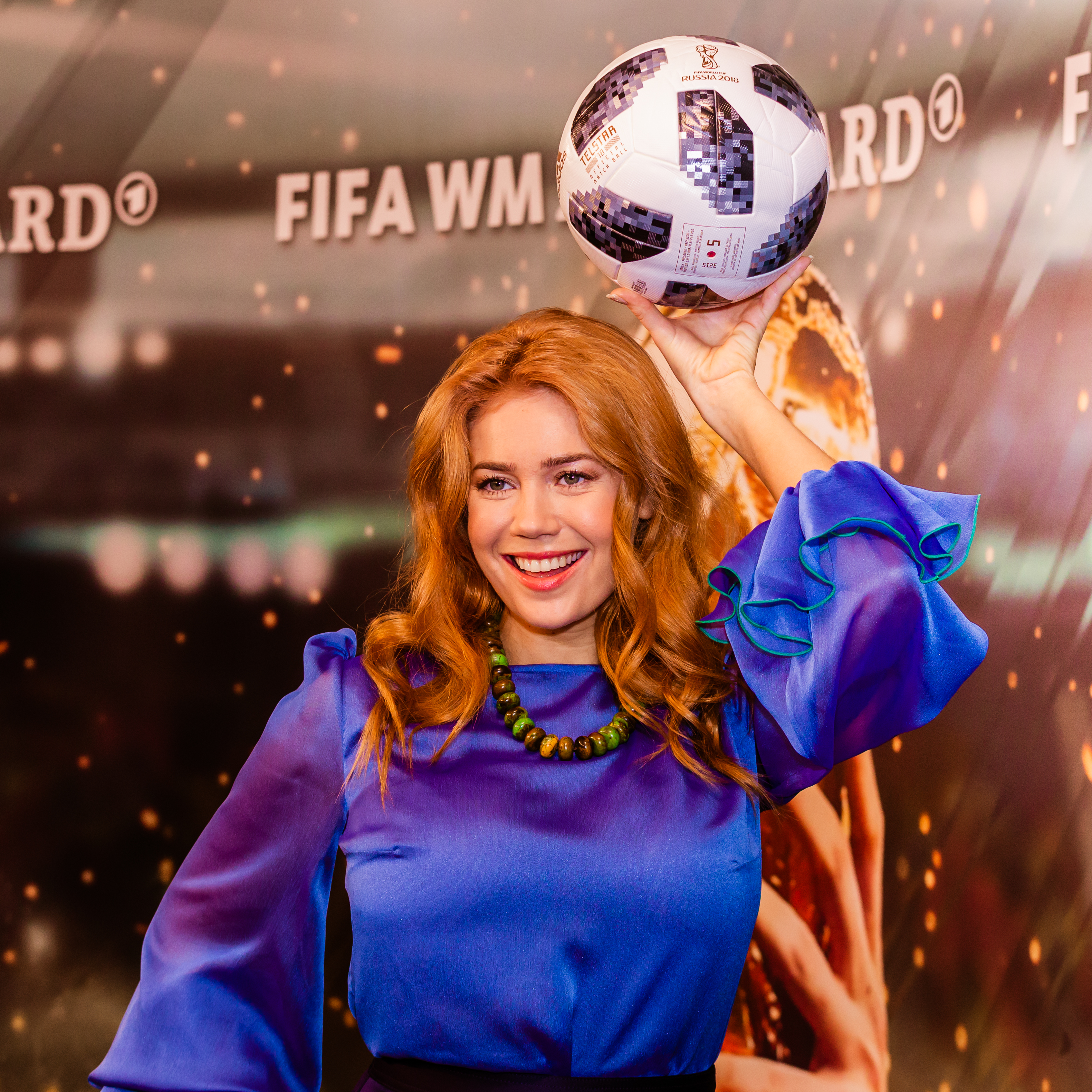 Palina Rojinski; Moderatorin und Schauspielerin; ARD-Reporterin